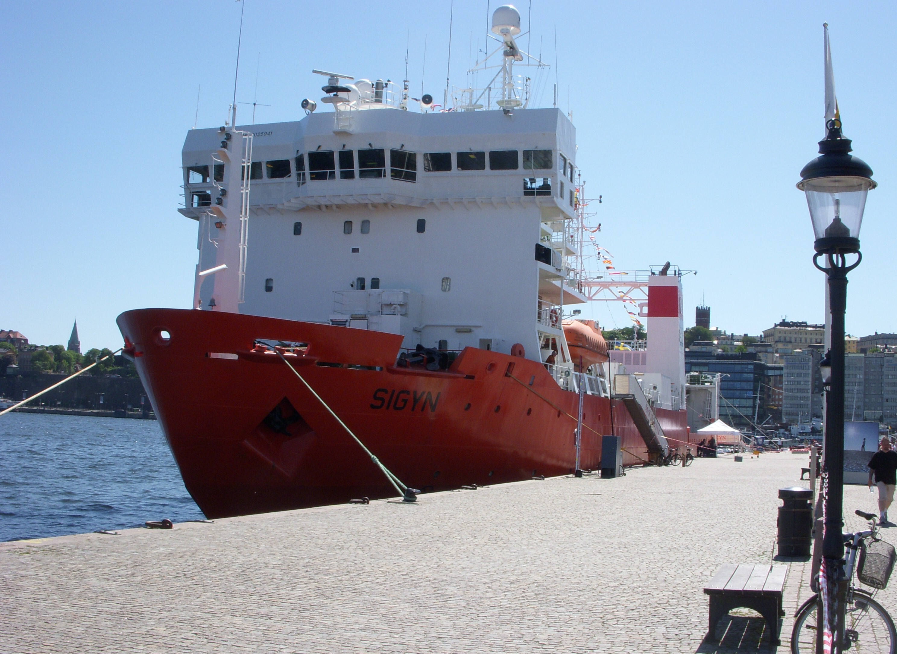 Kärnavfallsbåten "Sigyn" vid Skeppsbron i Stockholm